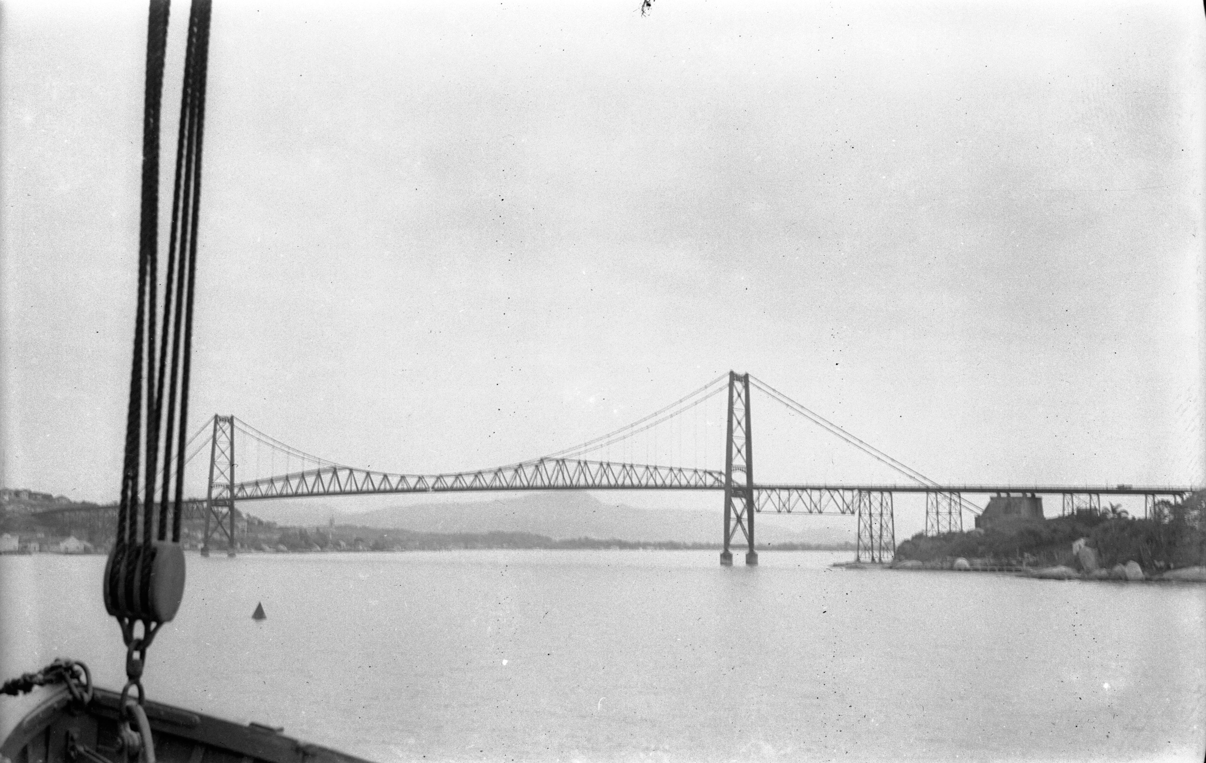 Florianópolis. Ponte Hercílio Luz vista do mar em 1940.